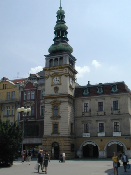 Ostravské muzeum